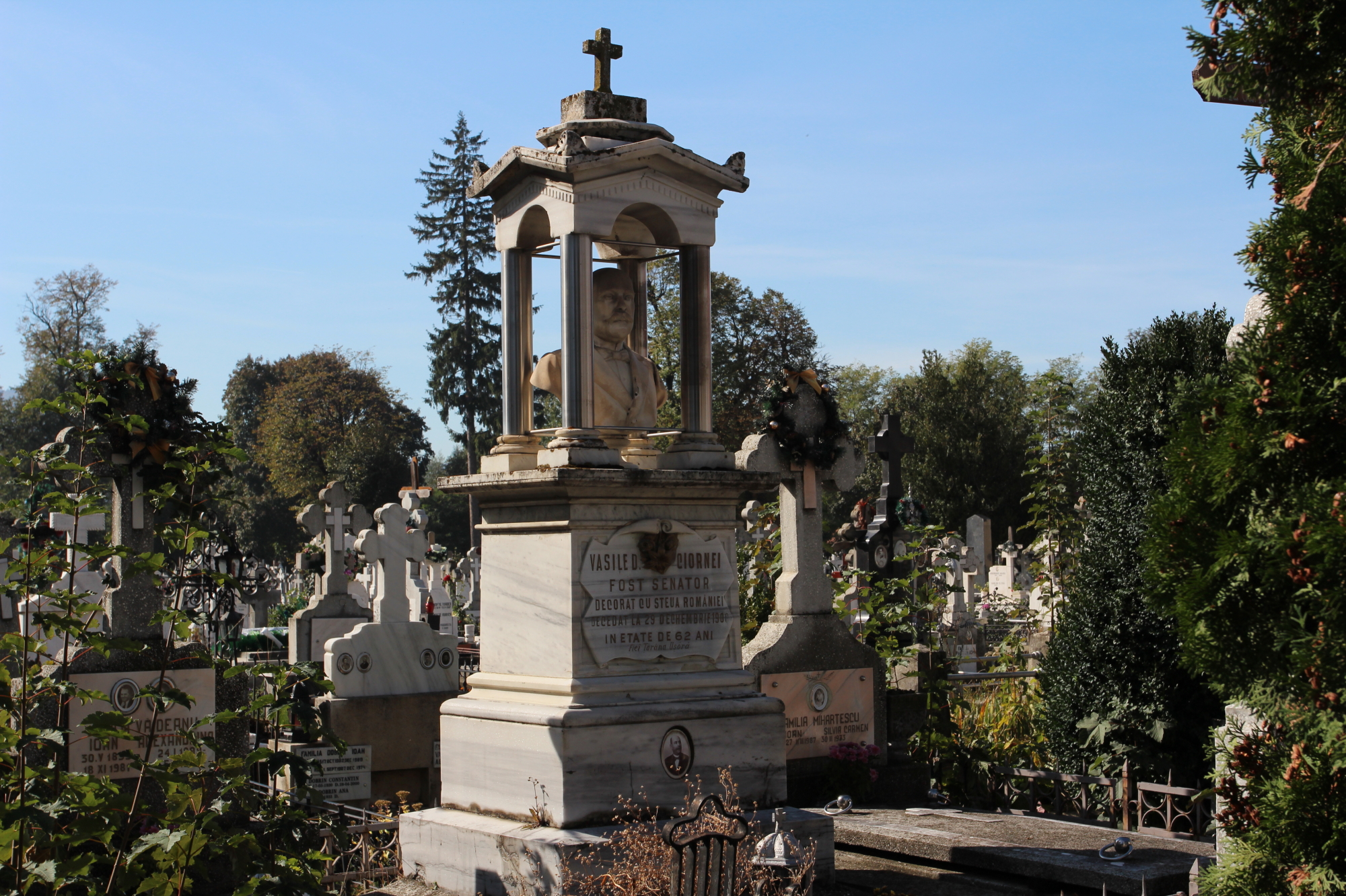 Monument funerar din piatră - "Familia senator V. Ciornei"